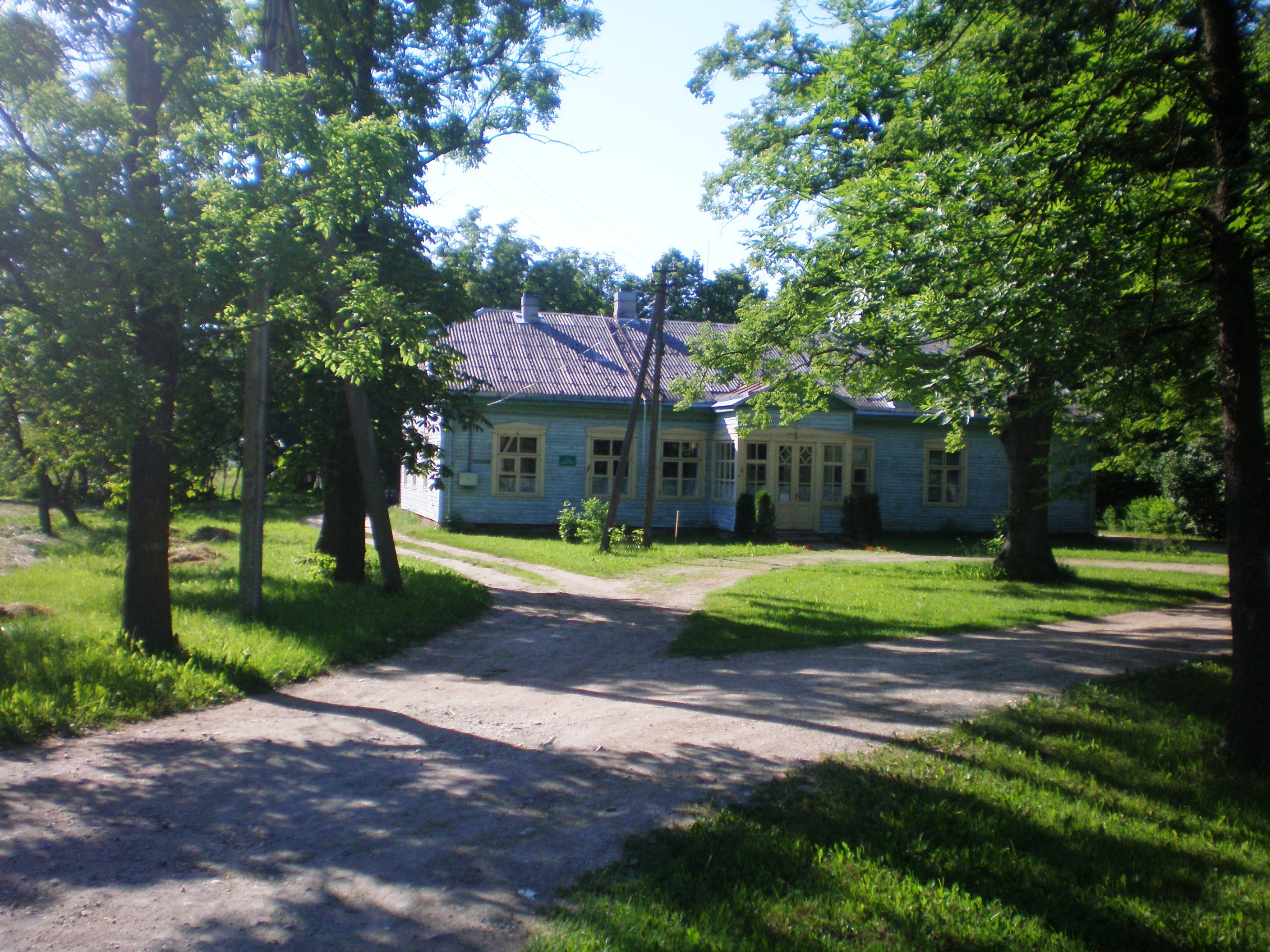 Kalnaberžė medicine station